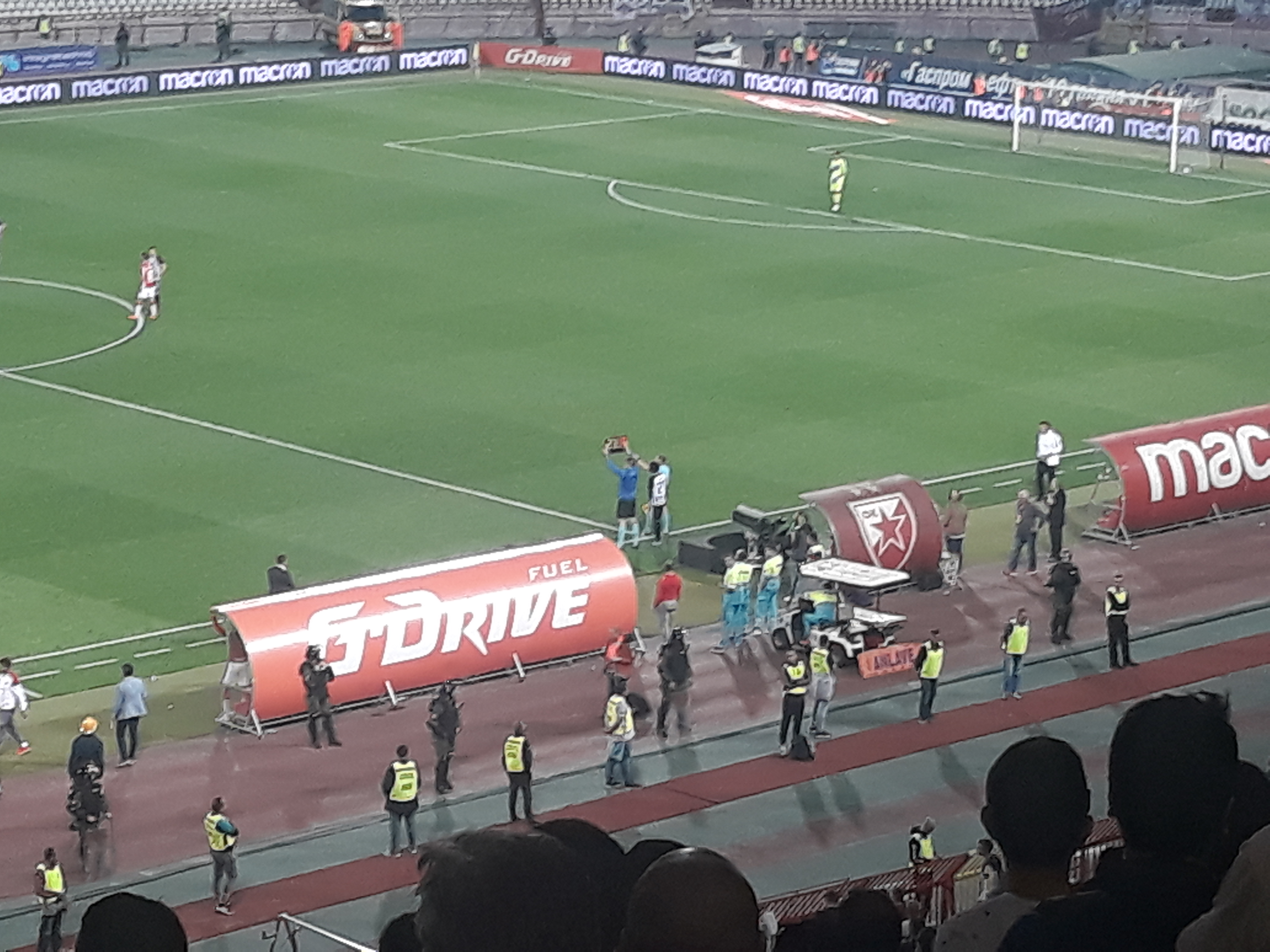 160. Вечити дерби, између Црвене звезде и Партизана, одигран на Стадиону Рајко Митић у Београду.